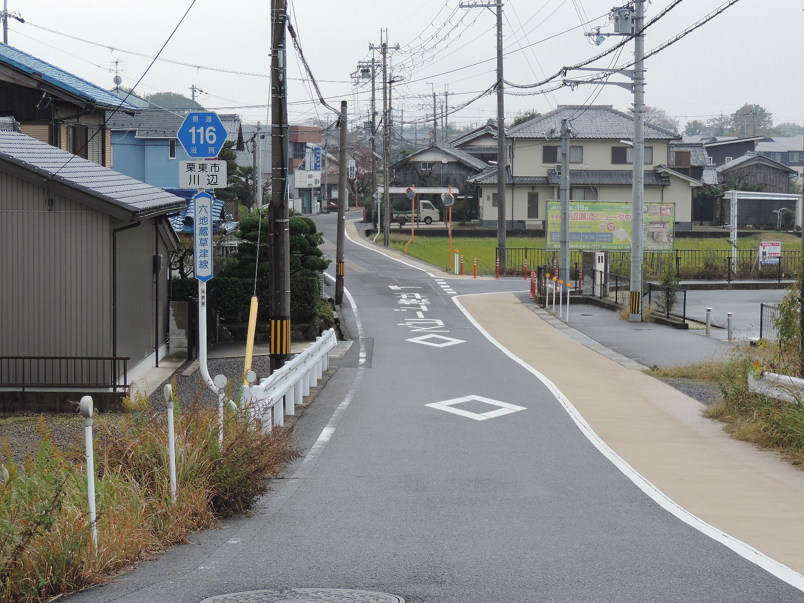 滋賀県道116号六地蔵草津線。栗東市川辺にて。2017年撮影